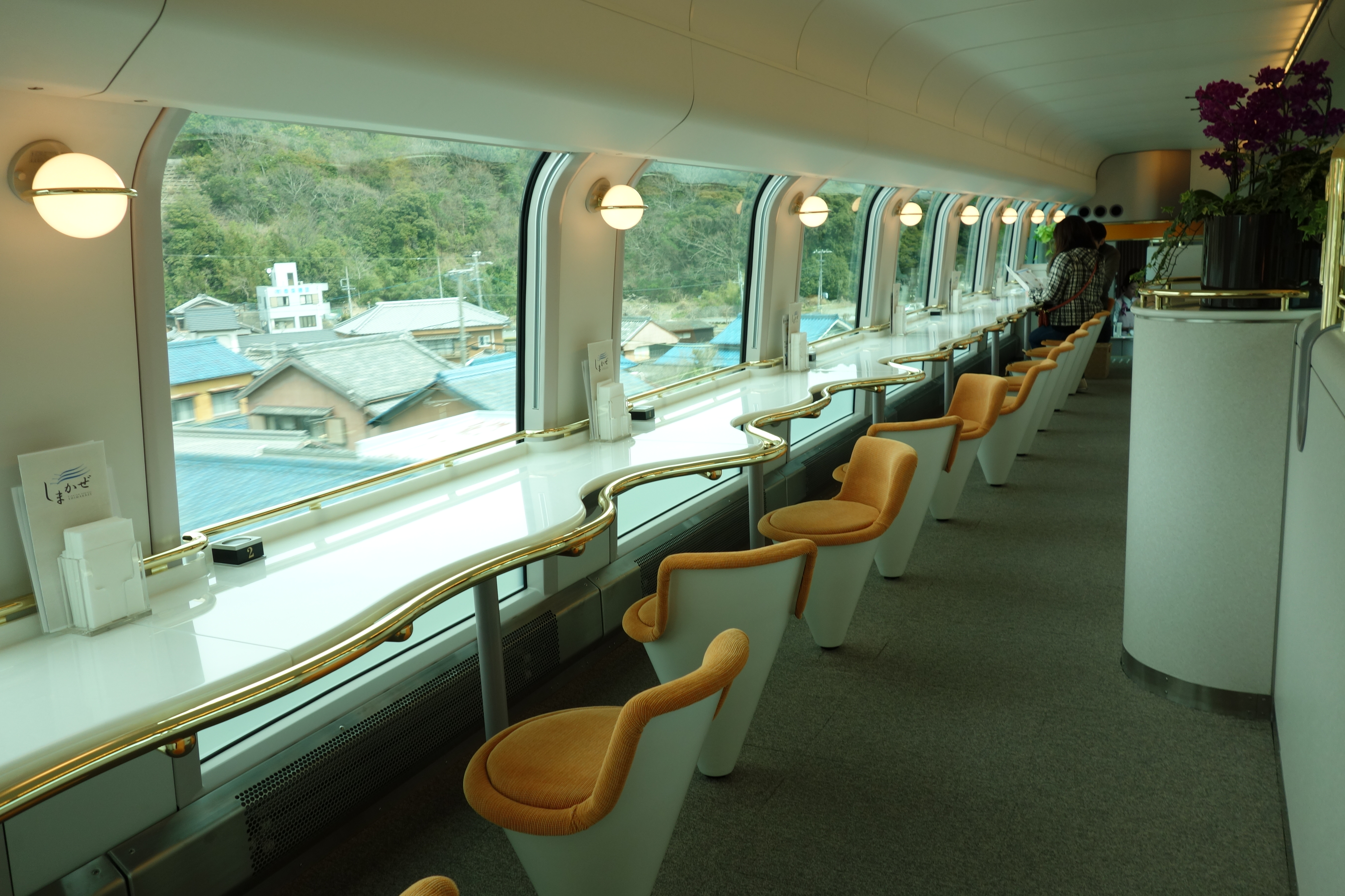 しまかぜ カフェ車両（2階）